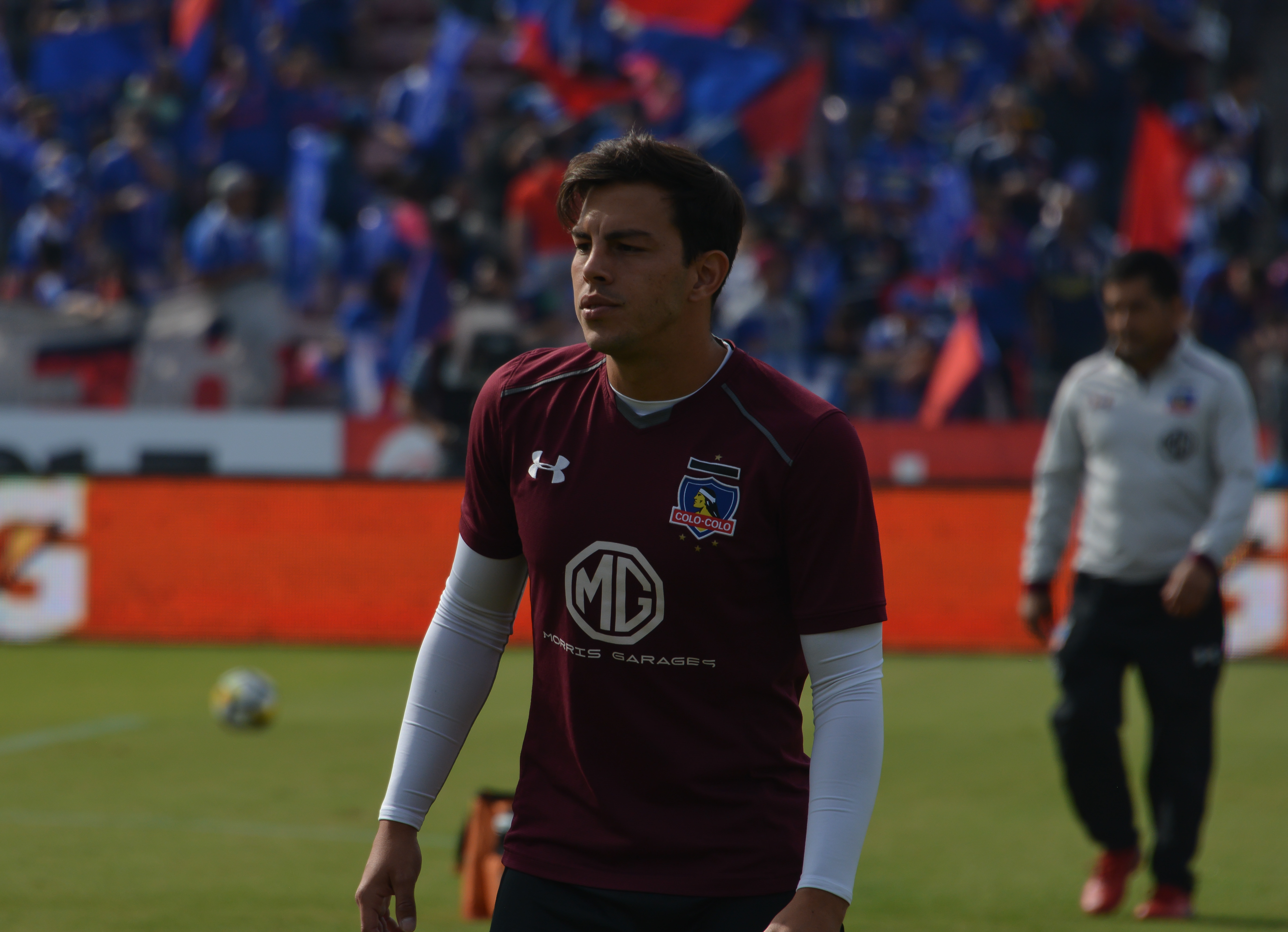 Fernando Meza, Universidad de Chile v Colo-Colo, Estadio Nacional, Santiago, Chile.